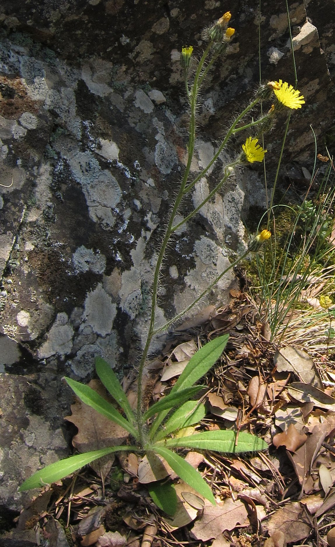 Hieracium anchusoides Arv.-Touv, exemple del subgènere pilosella amb tija foliosa i diversos capítols.